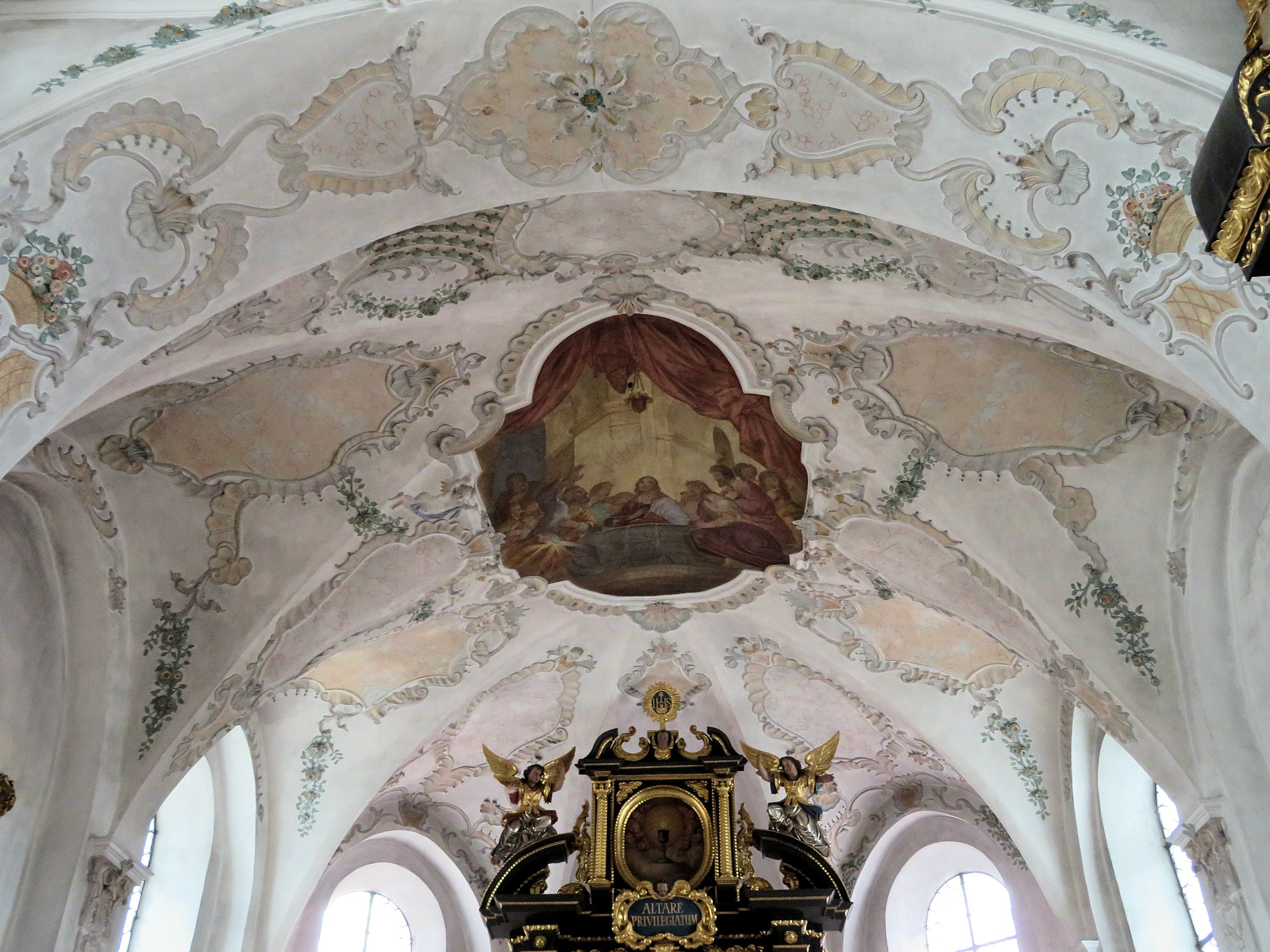 St. Peter und Paul in Hopfen am See ist eine barockisierte Kirche, deren Ursprünge wohl auf das 11. Jh. zurückgehen. Sie enthält gotische Fresken und Malereien von Claudius Schraudolph dem Älteren sowie Stuck von Joseph Fischer aus Faulenbach.